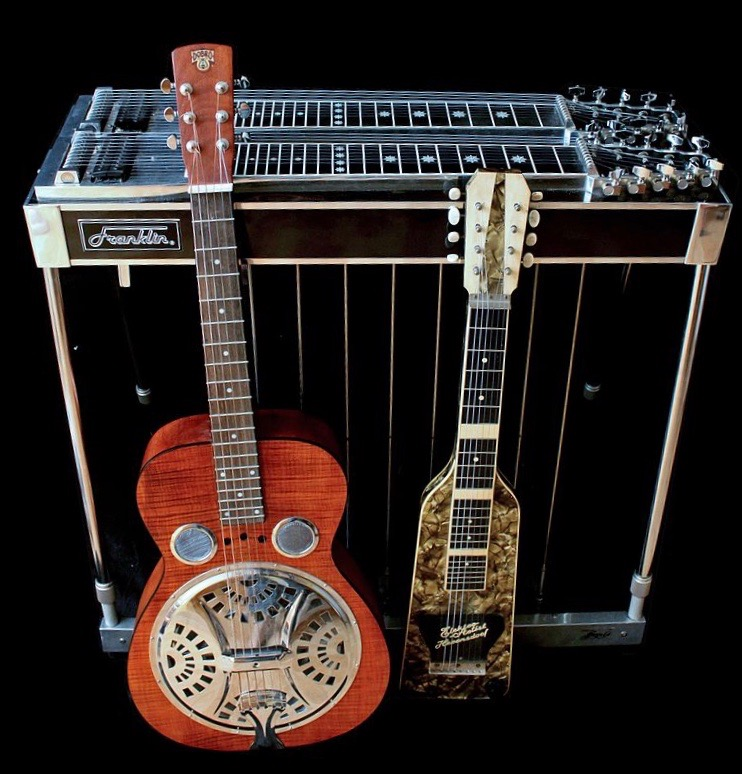 steel guitar left: Resonator guitar by Dobro right: Lap steel guitar by Herensdorf (?), Elektro Artist model rear: Pedal steel guitar by Frankilin Pedal Steel Guitar Co., Paul Franklin